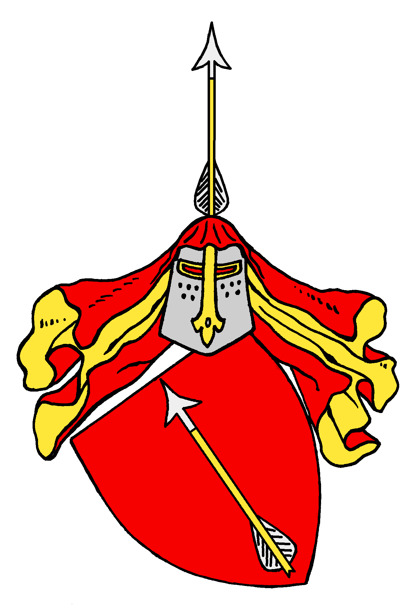 Stammwappen (von) Sprecher (von Strassberg; von Bernegg)